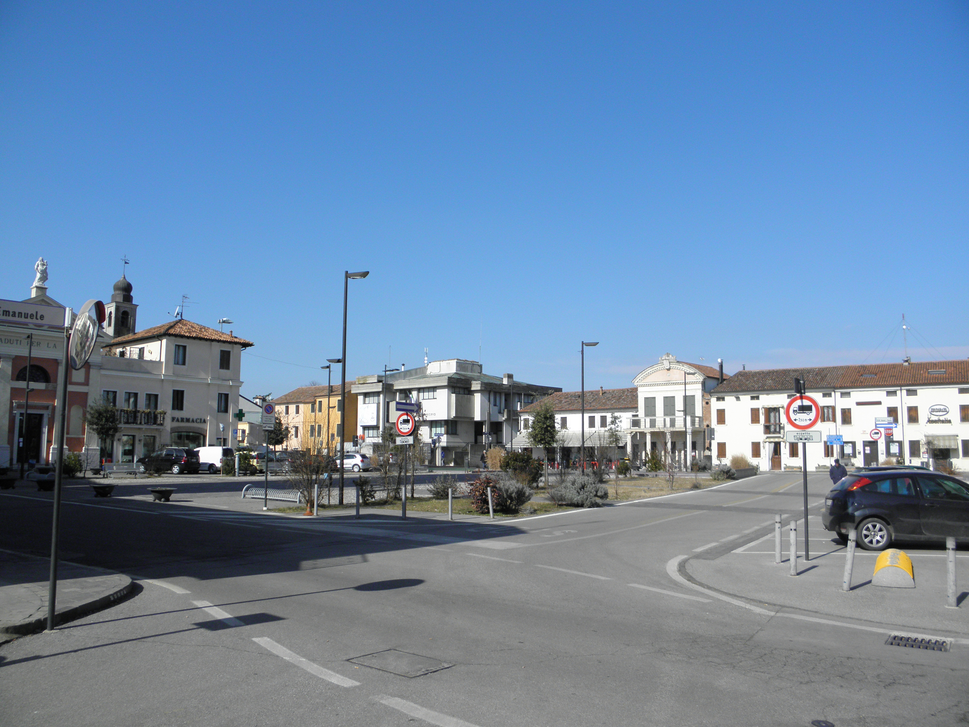 Costa di Rovigo: Piazze San Rocco e San Giovanni Battista viste da Via Vittorio Emanuele II.